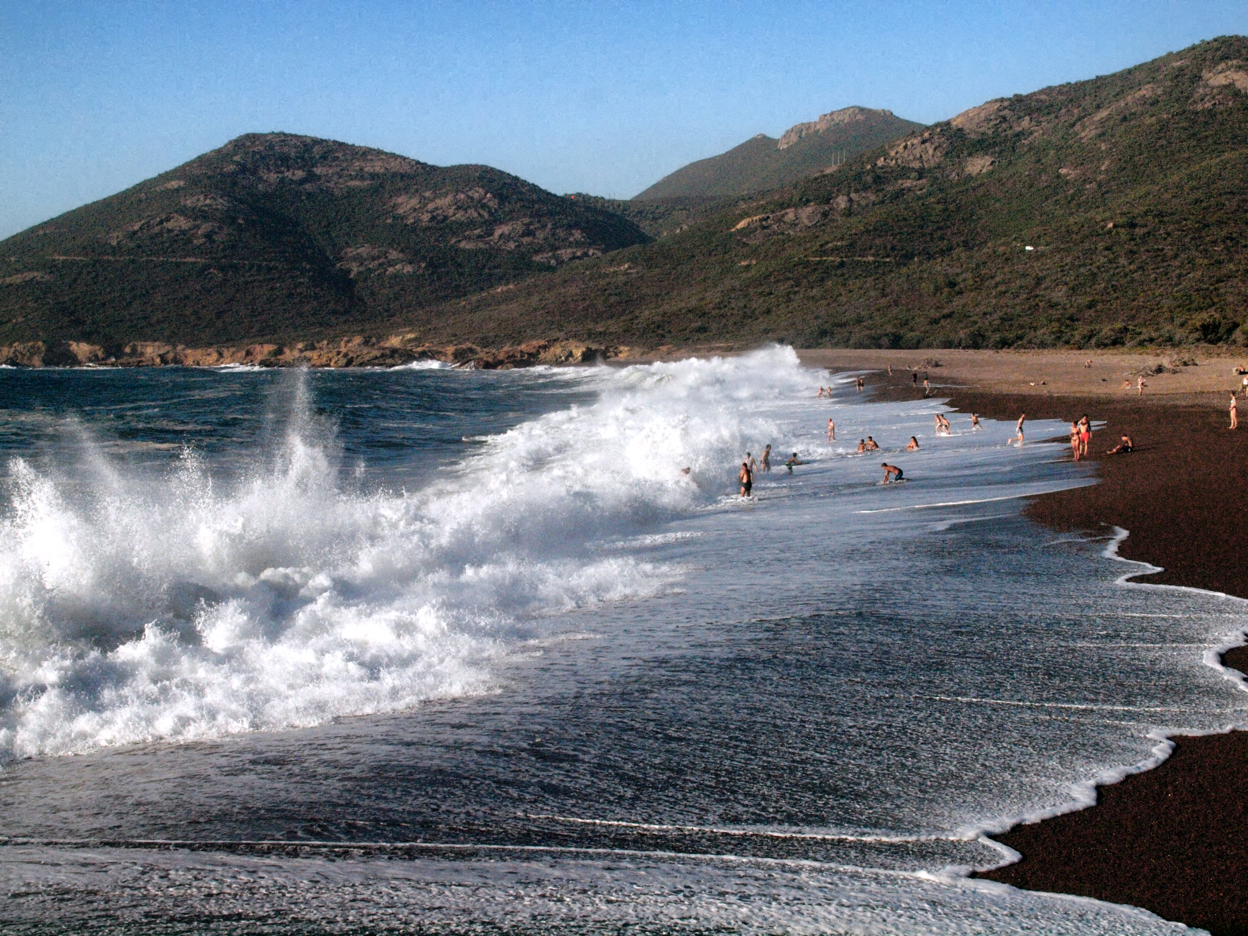 Galéria, Balagne (Corse) - La plage de la Tour à l'embouchure du Fango